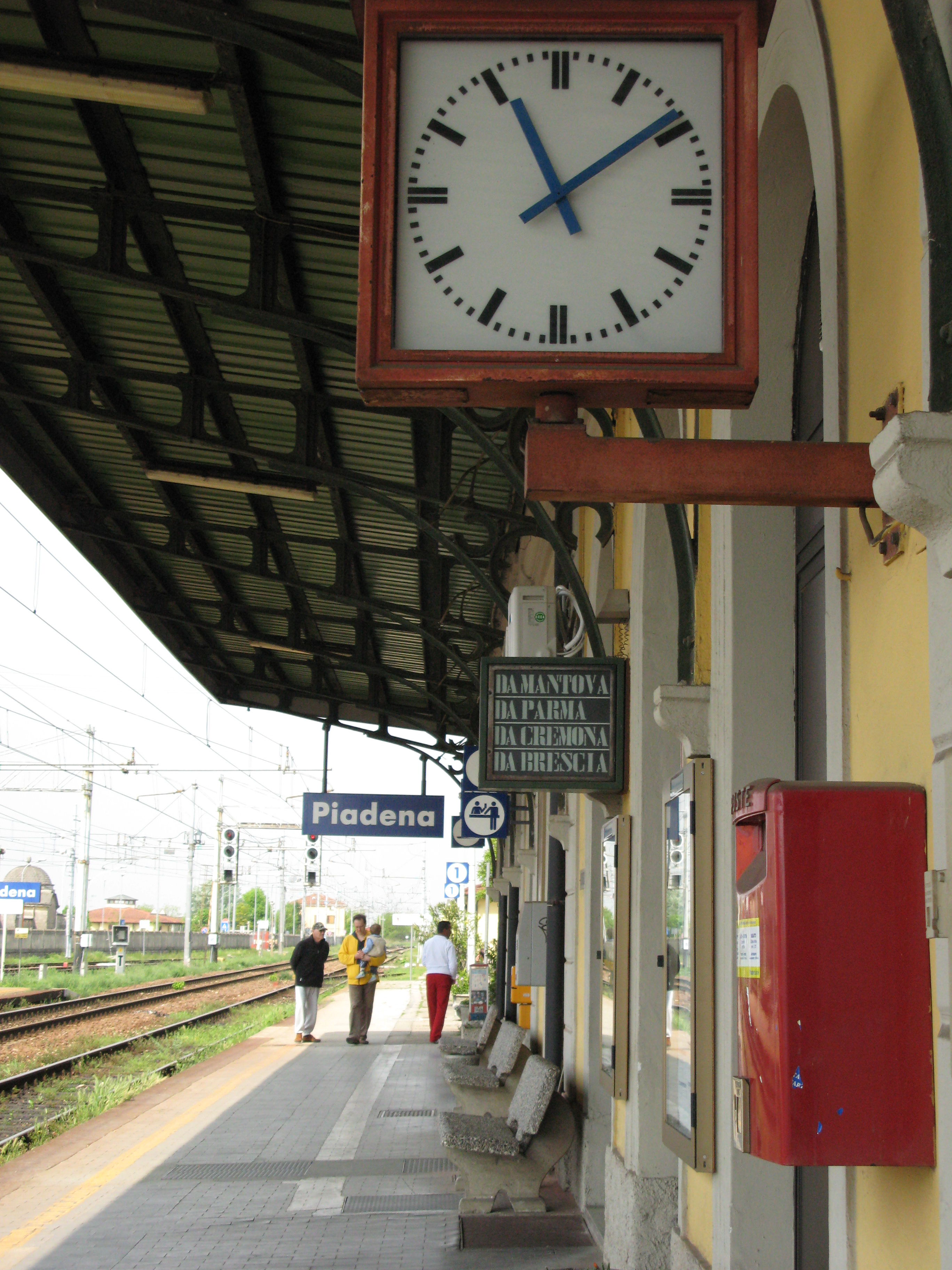 Stazione ferroviaria di Piadena